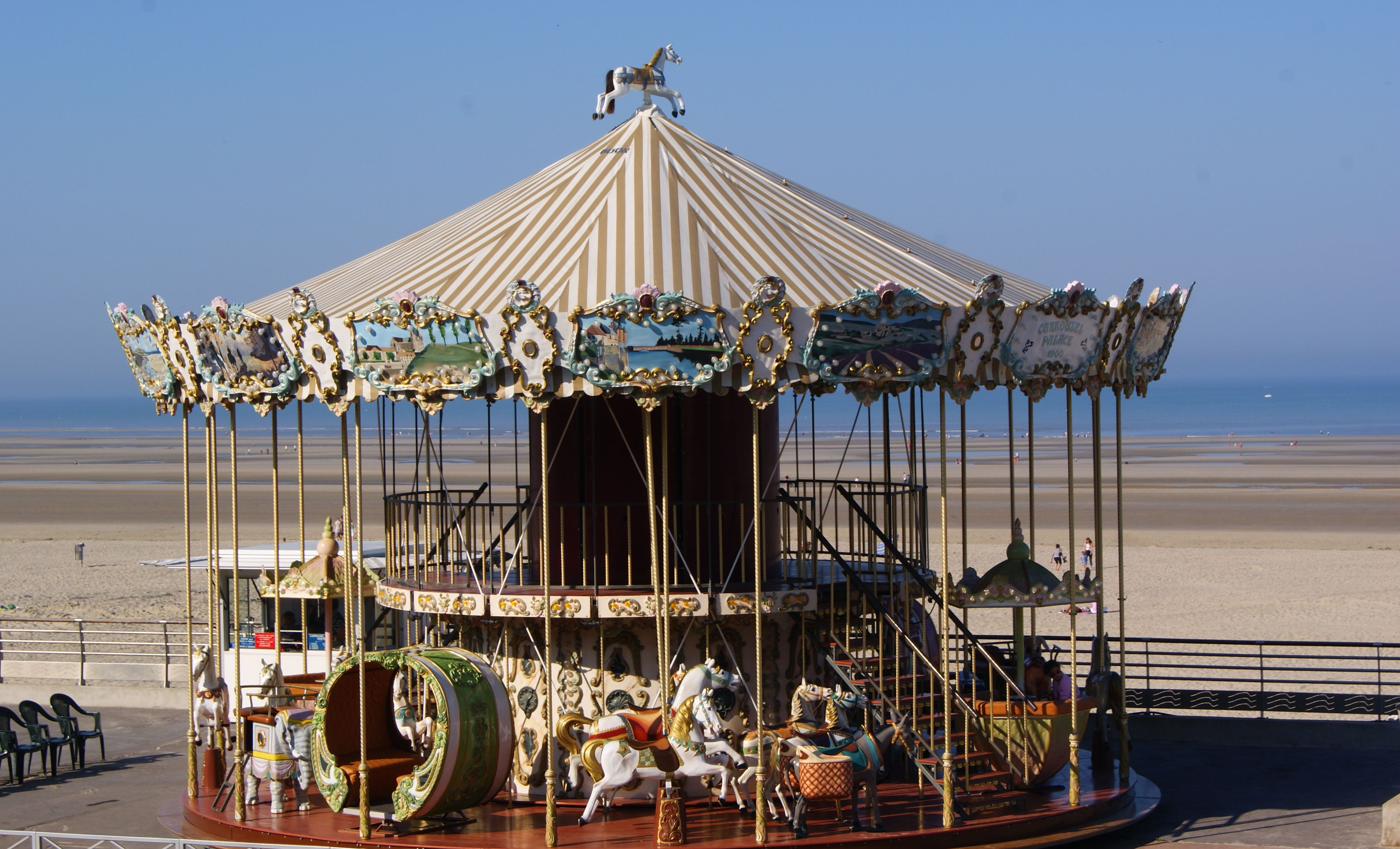 Manège à Berck